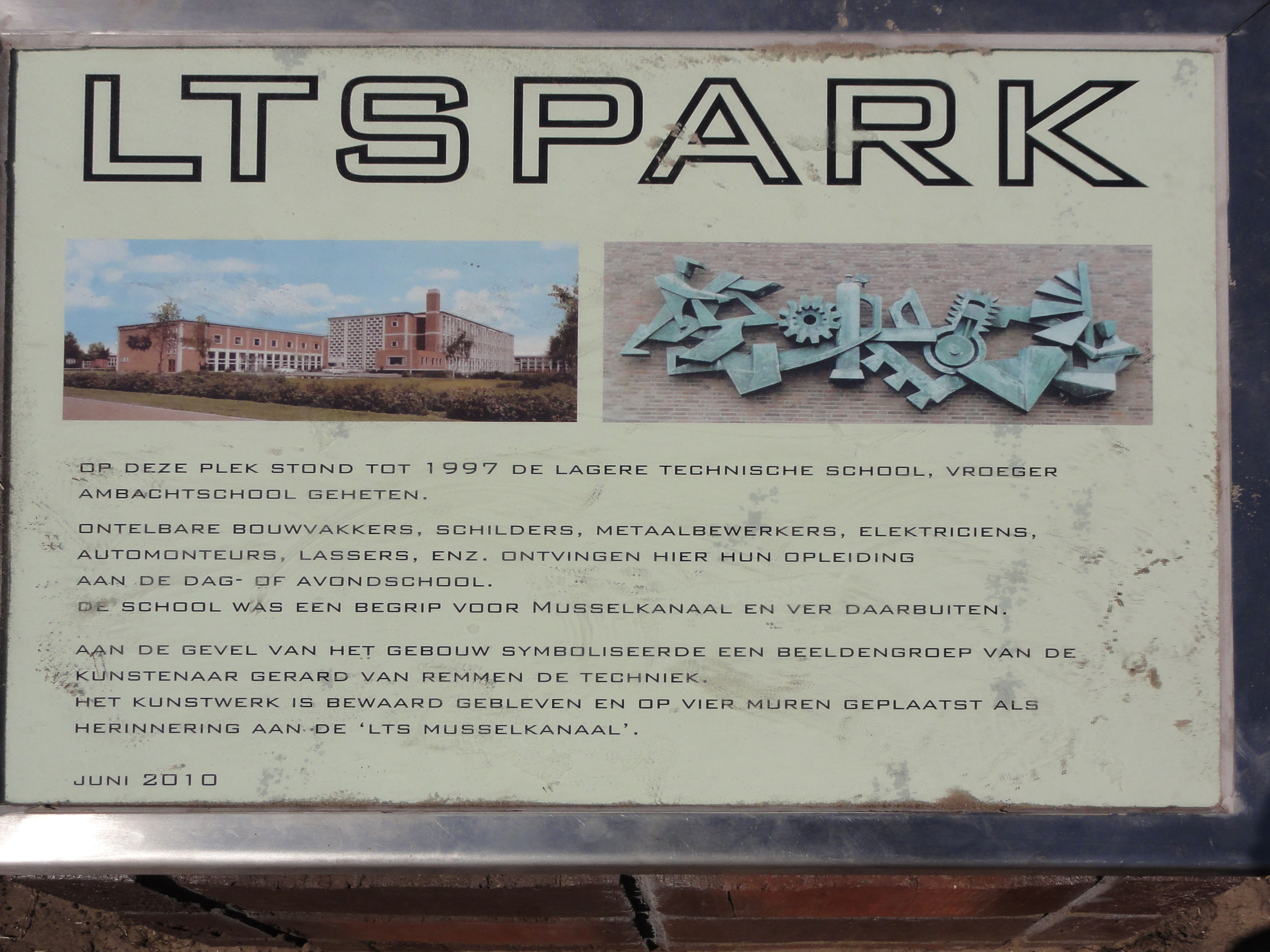 Plaquette bij Beeldengroep van Gerard van Remmen, oorspronkelijk als groep op de muur van de in 1997 afgebroken LTS van Musselkanaal, in juni 2010 als vierdelig kunstwerk herplaatst in het LTSpark te Musselkanaal, op de oorspronkelijke plek van de school)